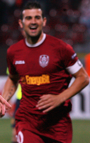 Ricardo Cadu.